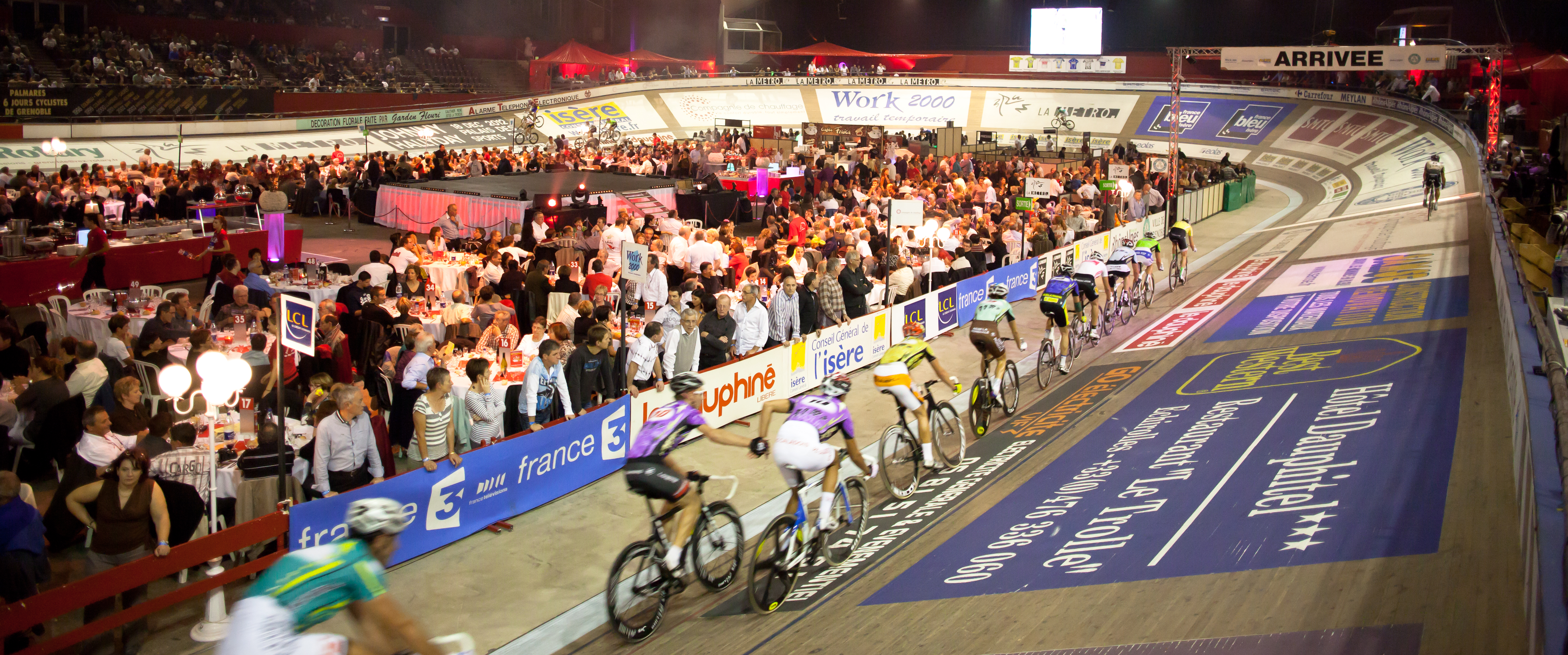 Six jours de Grenoble 2011